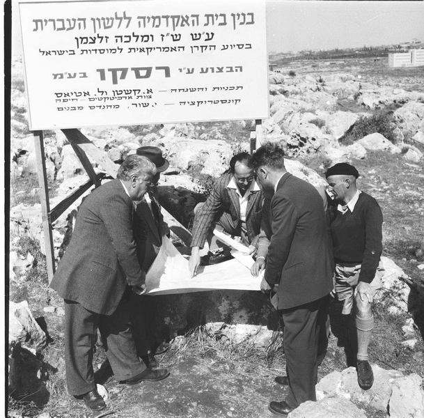 האקדמיה ללשון טקס אבן הפינה 1956